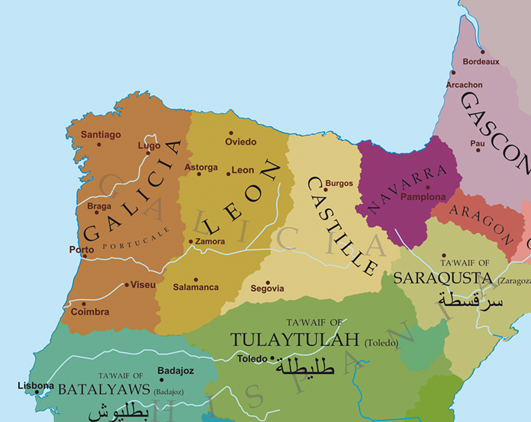 Mapa político do noroeste da Península Ibérica a finais do século XI.